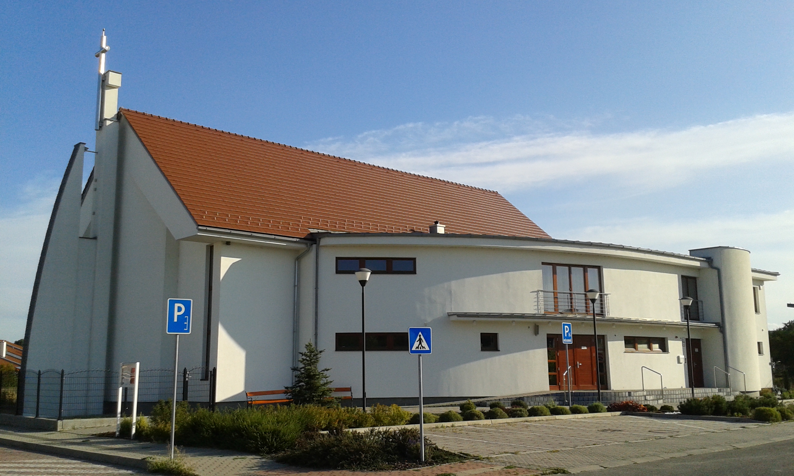 Kostol sv. Jána Pavla II. v Čiernej Vode